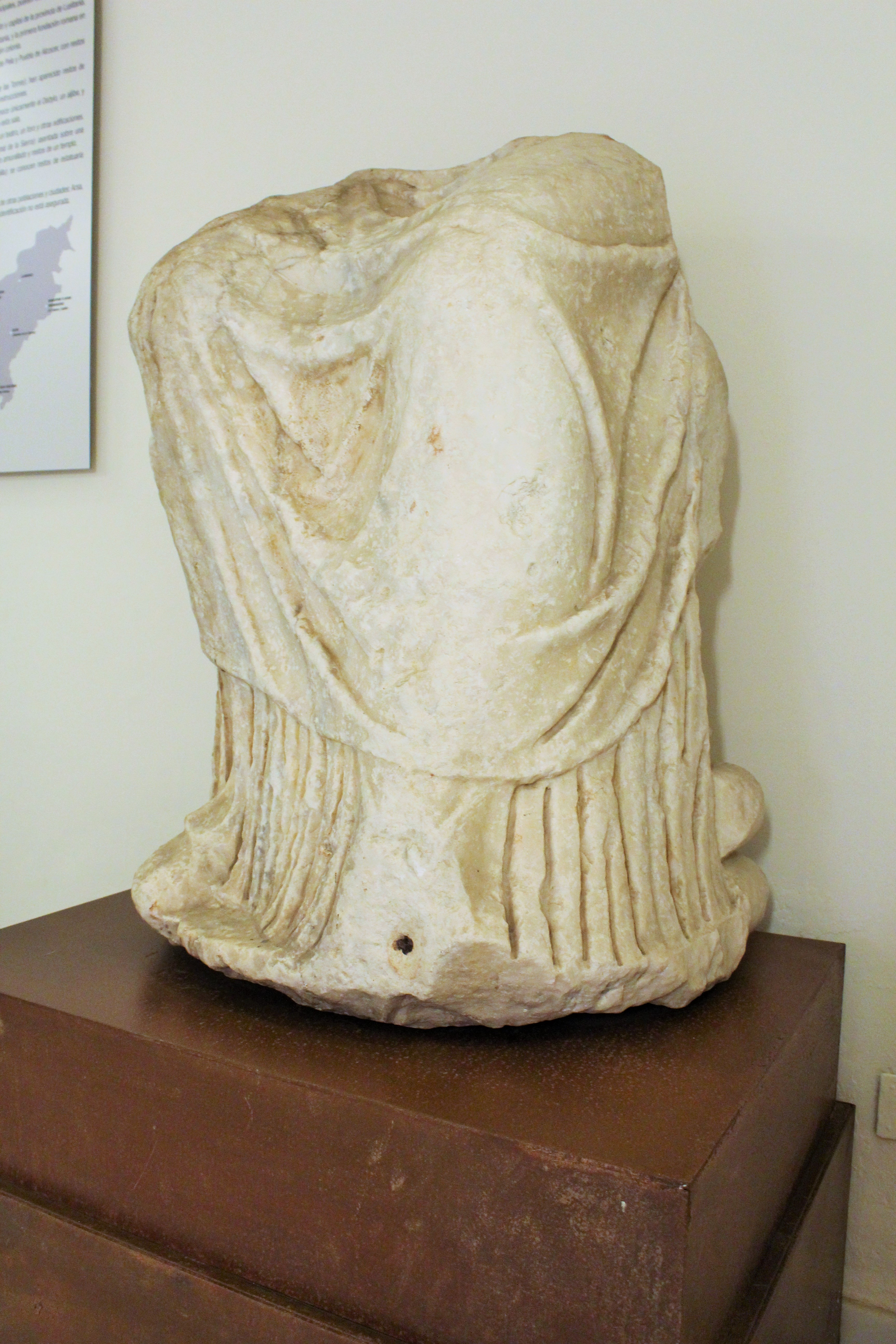 Parte inferior de una estatua sedente femenina. Siglo I d.C. Fue aprovechada en el siglo XVI para tallar en el dorso un escudo nobiliario, probablemente de Sancho de Paz